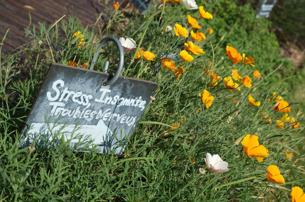 ajout contenu